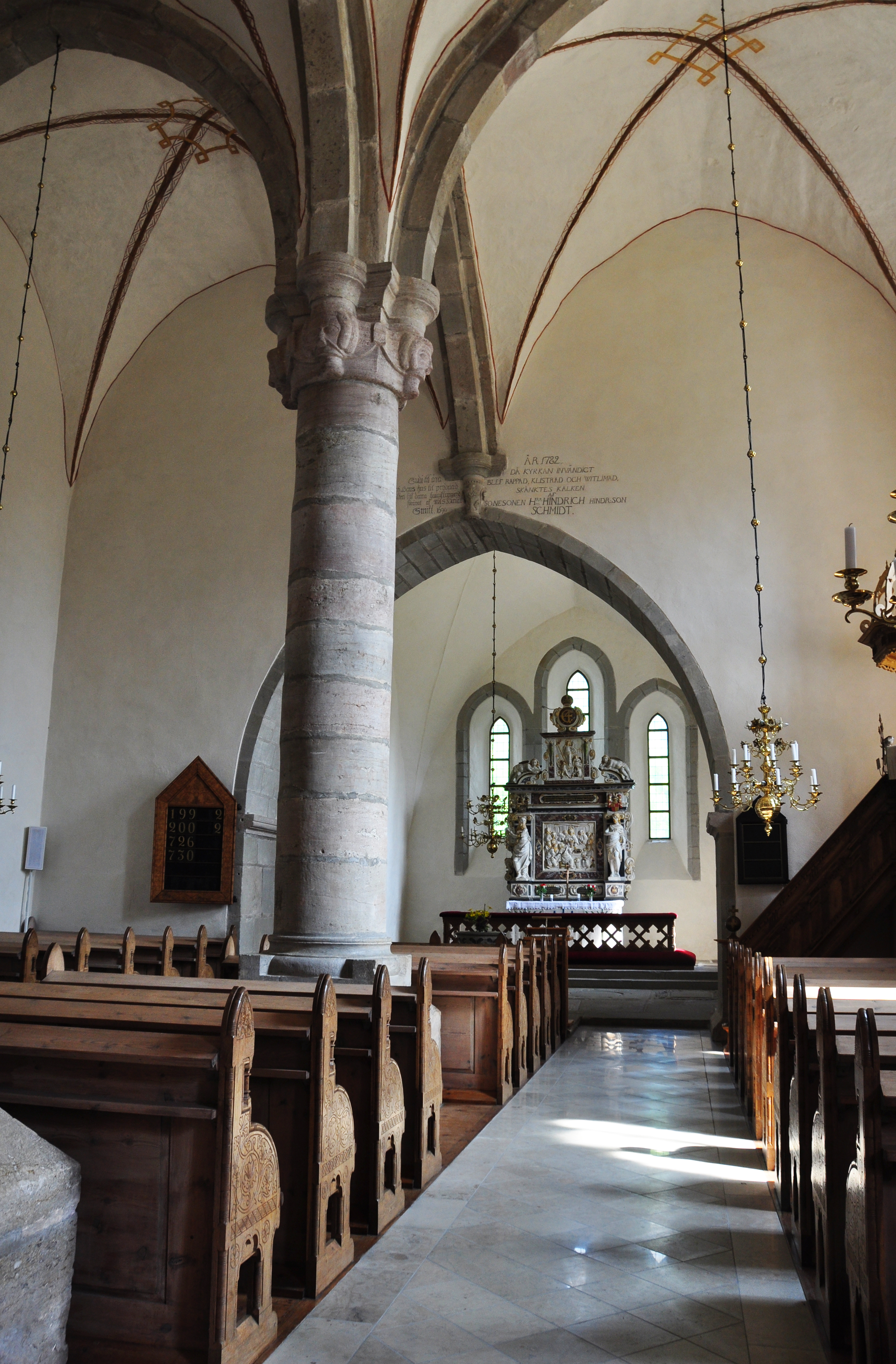 Långhuset Hablingbo kyrka, Gotland, med de stiliserade kapitälhuvudena som konsthistorikern Johnny Roosval tyckte påminde om Hathorkapitäl i det gamla Egypten. Detta gjorde att han gav stenmästare smeknamnet "Egypticus". BBR anläggnins-ID: 21300000002682